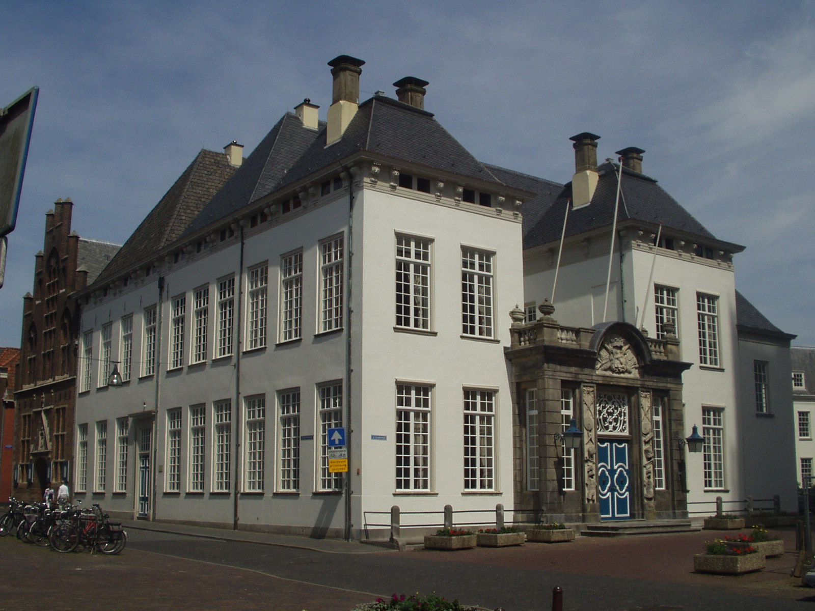 Zutphen city hall (gemeentehuis)